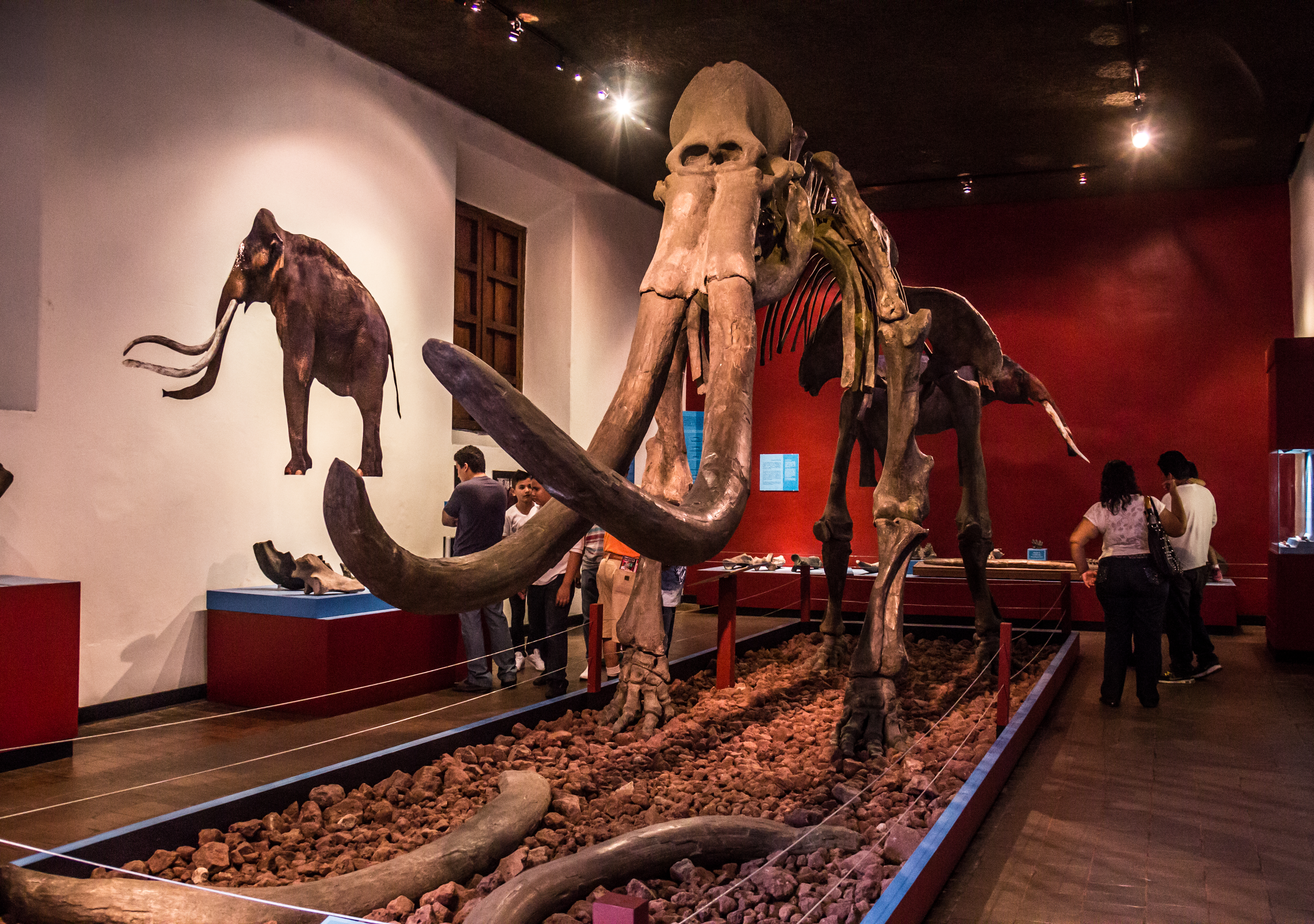 Museo Regional de Guadalajara